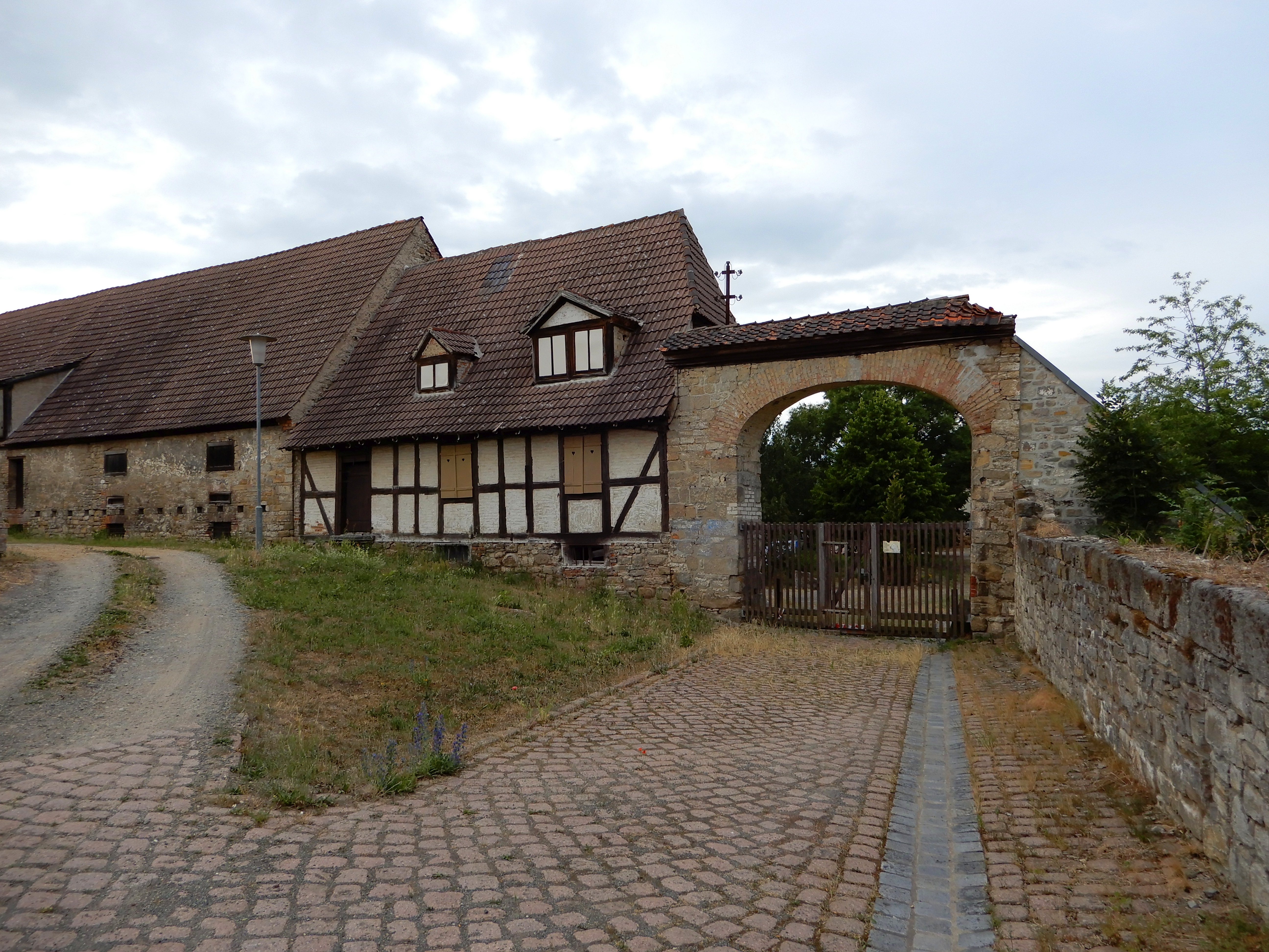 Domäne Frose